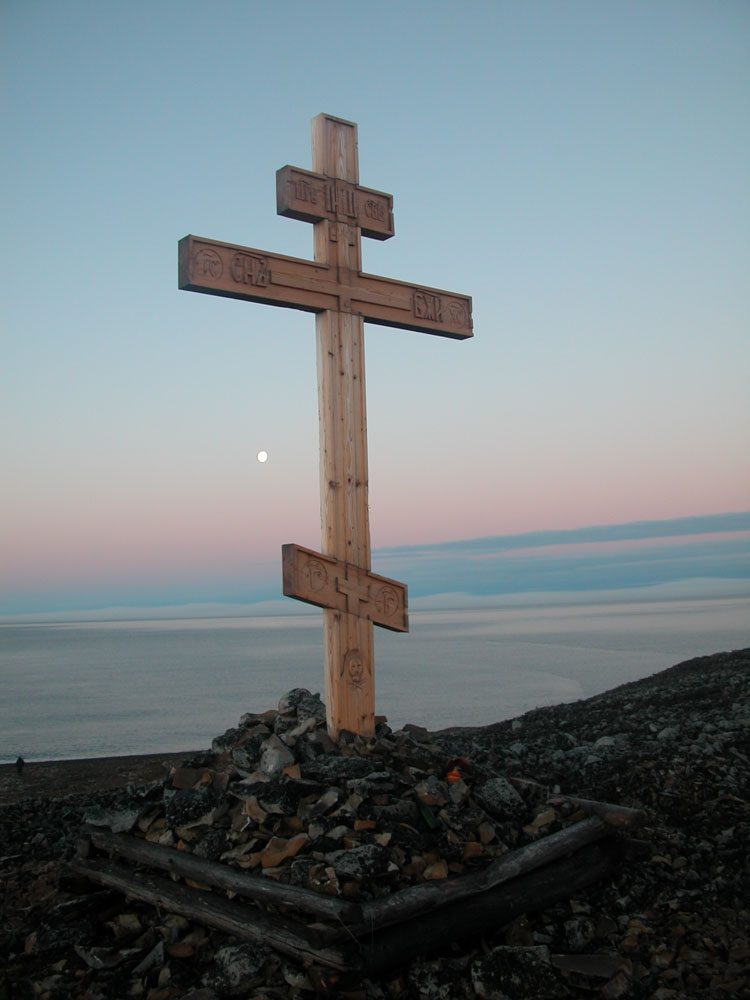 Крест, установленный в 2003 г. в память о спасательной экспедиции Колчака